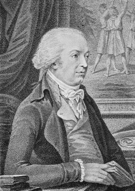 Das Bild stammt aus Bilderatlas zur Geschichte der deutschen Nationallitteratur von Gustav Könnecke. Zweite, verbesserte und vermehrte Auflage. Marburg: Elwert 1895. Nach einer Zeichnung von Vincenz Georg Kininger, Berlin 1791. Übrigens Das Bild ist gemeinfrei. Für Wikipedia eingescannt und zur Verfügung gestellt von --Goerdten 14:43, 25. Nov. 2006 (CET)